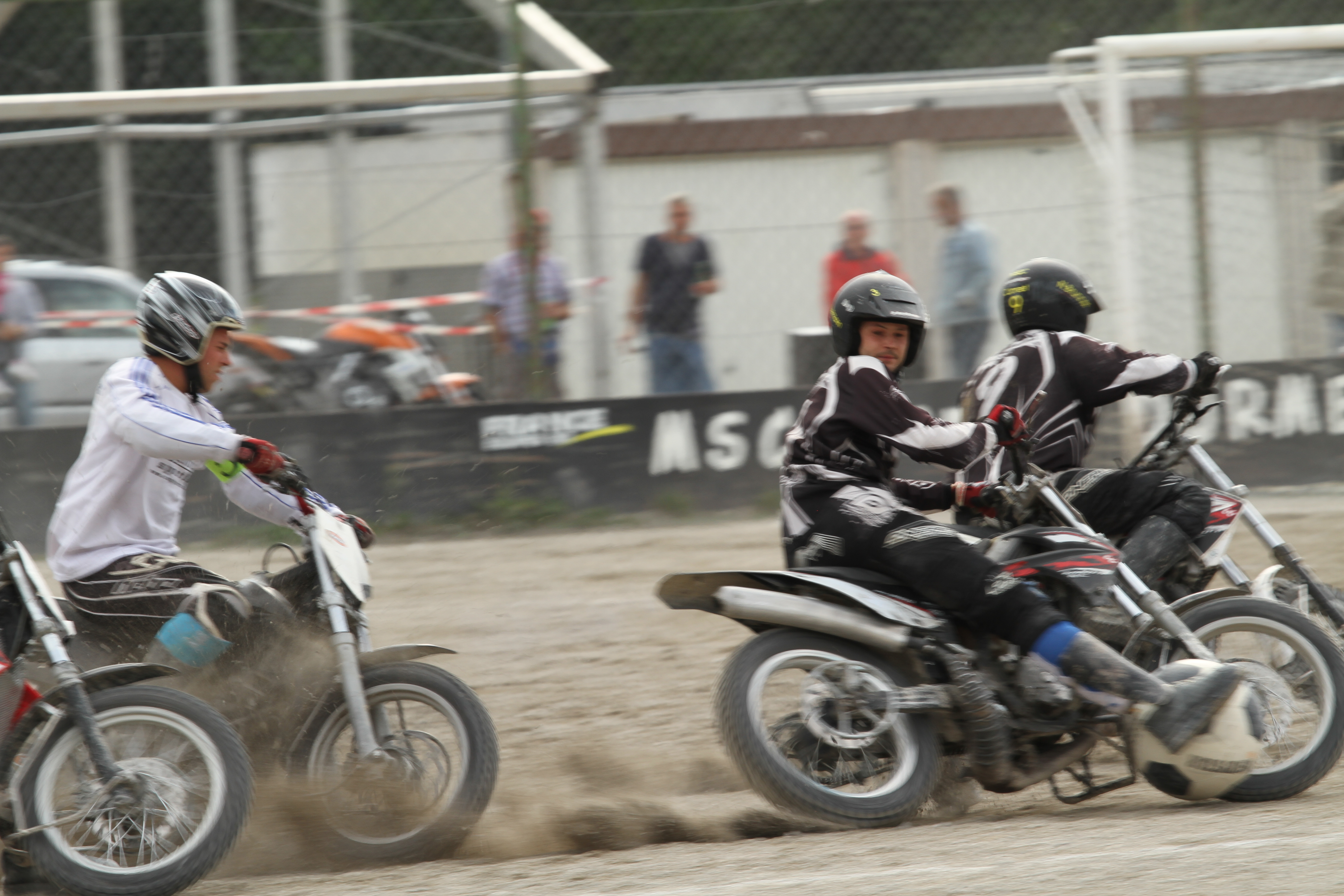 Ein Motoballspiel des MSC Comet Durmersheim gegen den MSC Philippsburg. Austragungsort war Durmersheim.